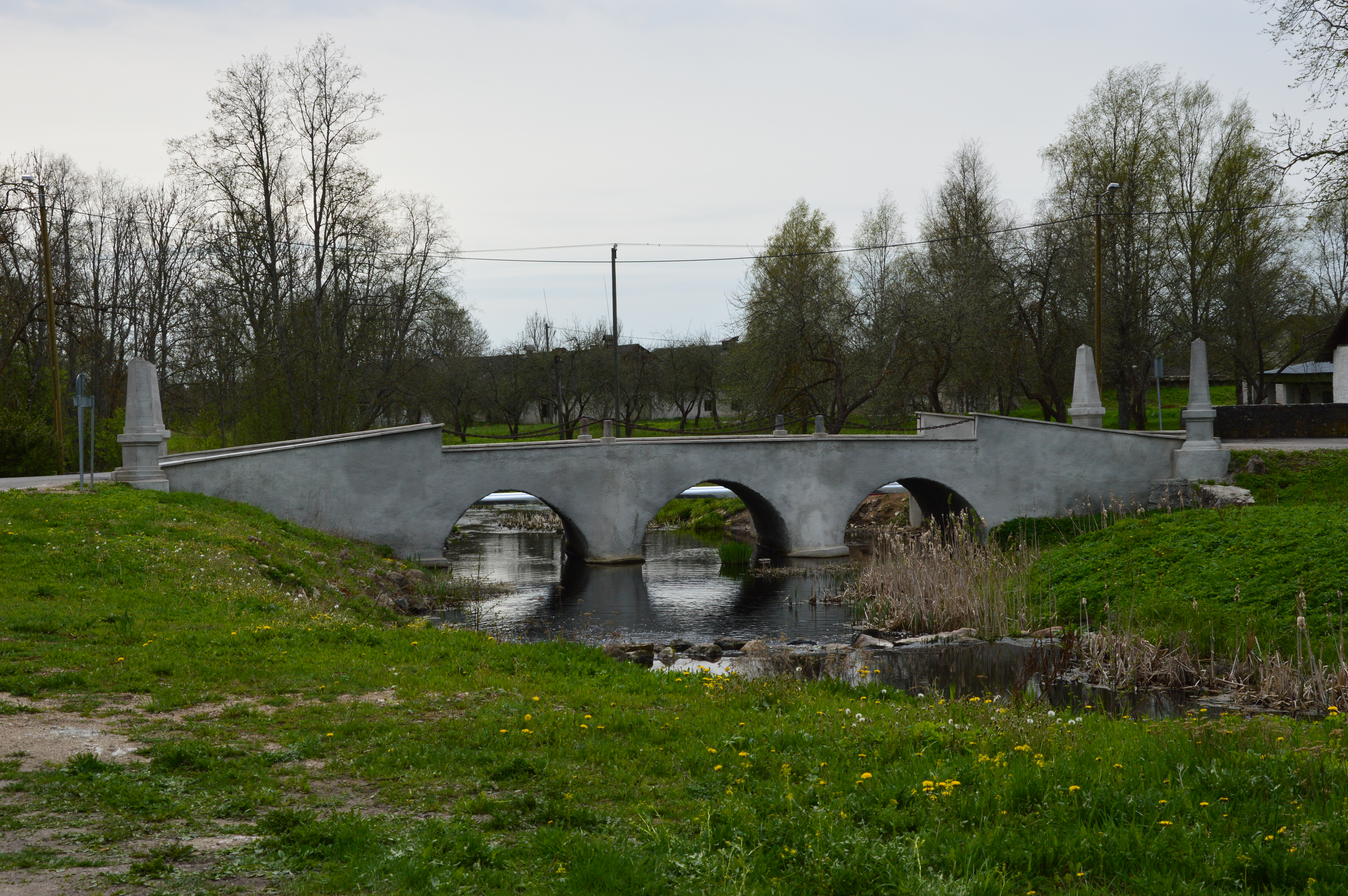 Koluvere mõisa viinavabriku sild.